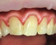 Gingivitt